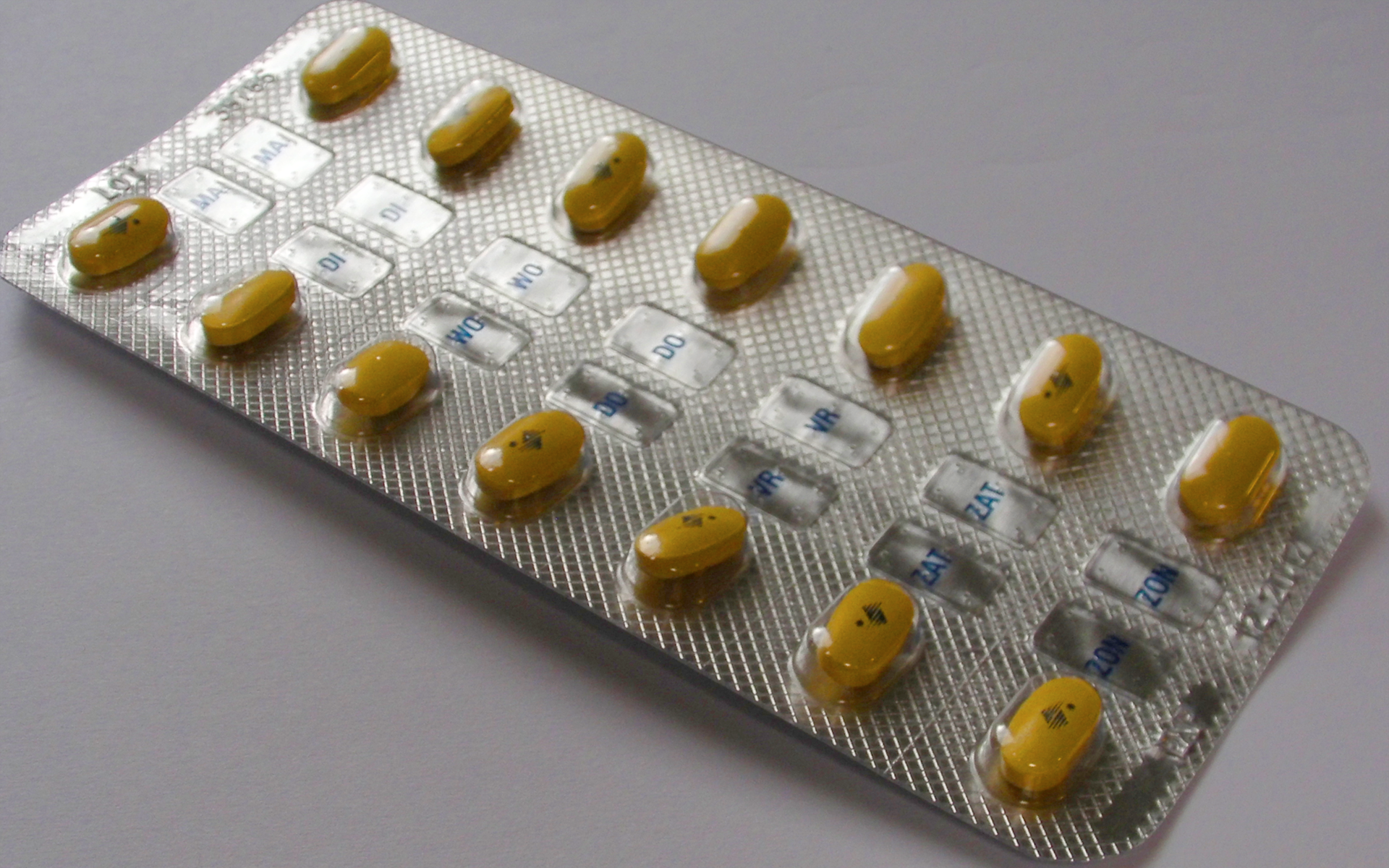 Een strip van 14 tabletten Valdoxan, met Nederlandse weekdagaanduiding.